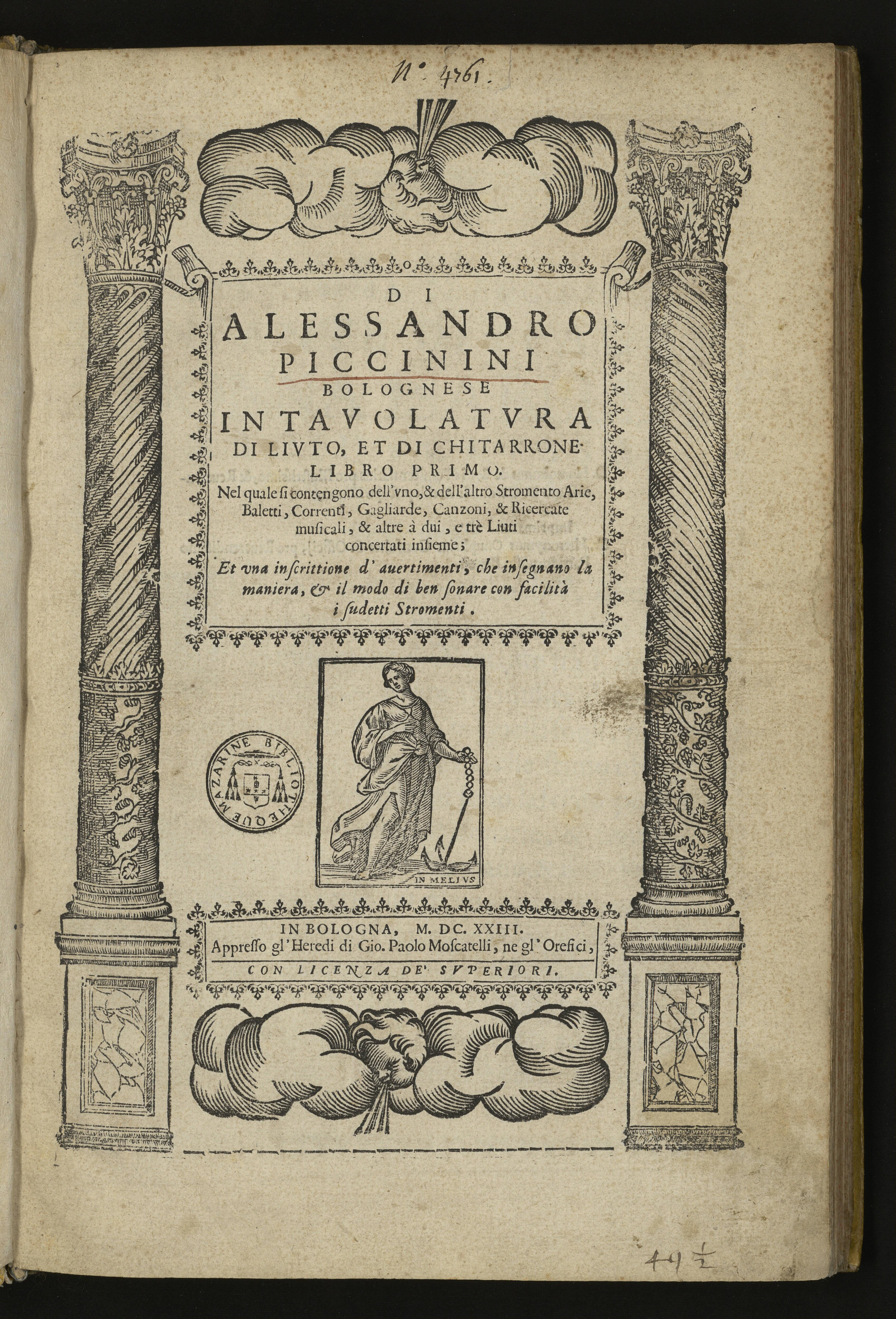 Di Alessandro Piccinini Bolognese intavolatura di liuto, et di chitarrone. Libro primo. Nel quale si contengono dell'uno, & dell'altro stromento arie, baletti, correnti, gagliarde, canzoni, & ricercate musicali, & altre à dui, e trè liuti concertati insieme ; et una inscrittione d'avertimenti, che insegnano la maniera, & il modo di ben sonare con facilità i sudetti stromenti. (titlepage)